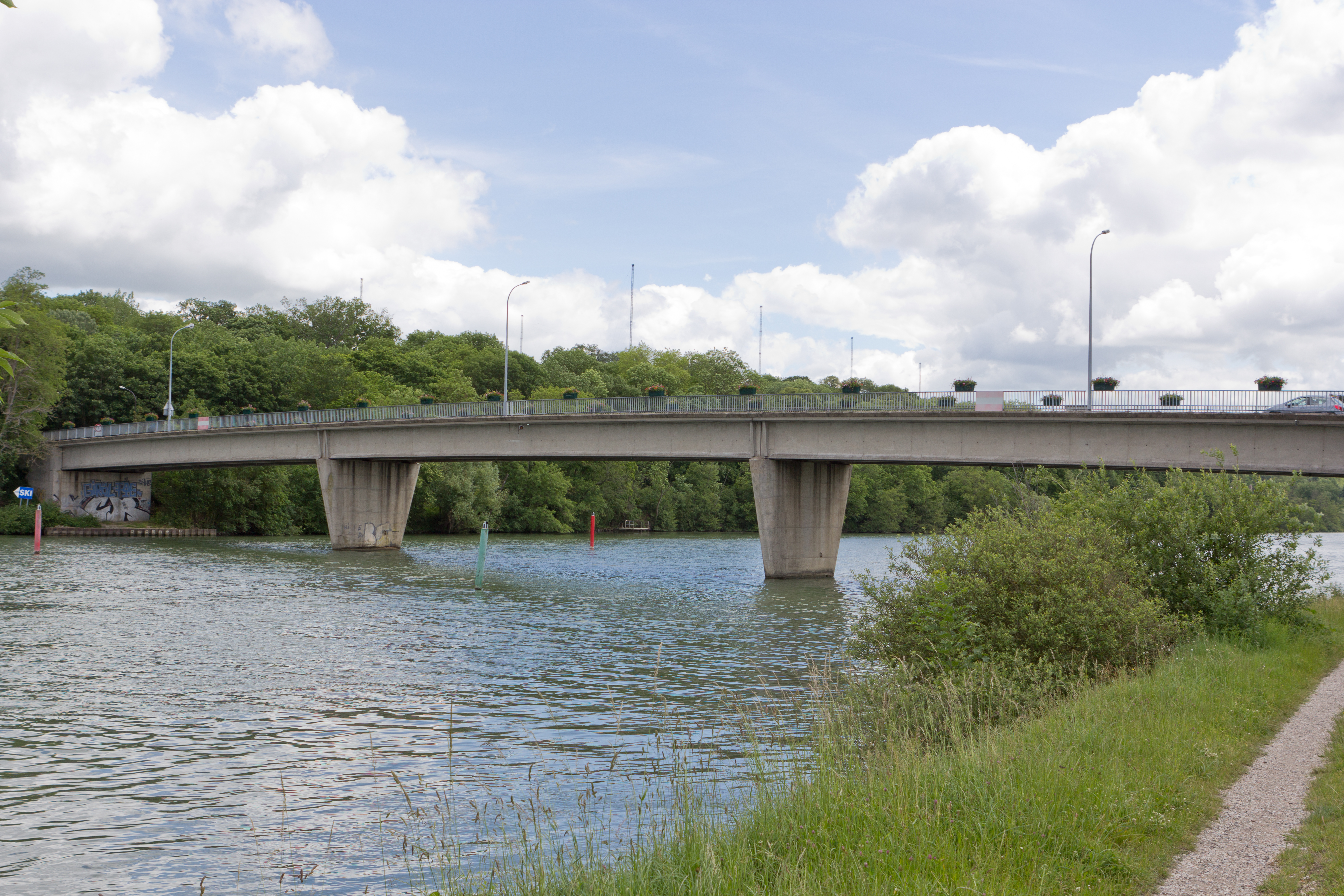 Le pont du Maréchal Juin sur la Seine entre les communes de Saint-Fargeau-Ponthierry et Seine-Port. Seine-et-Marne, France